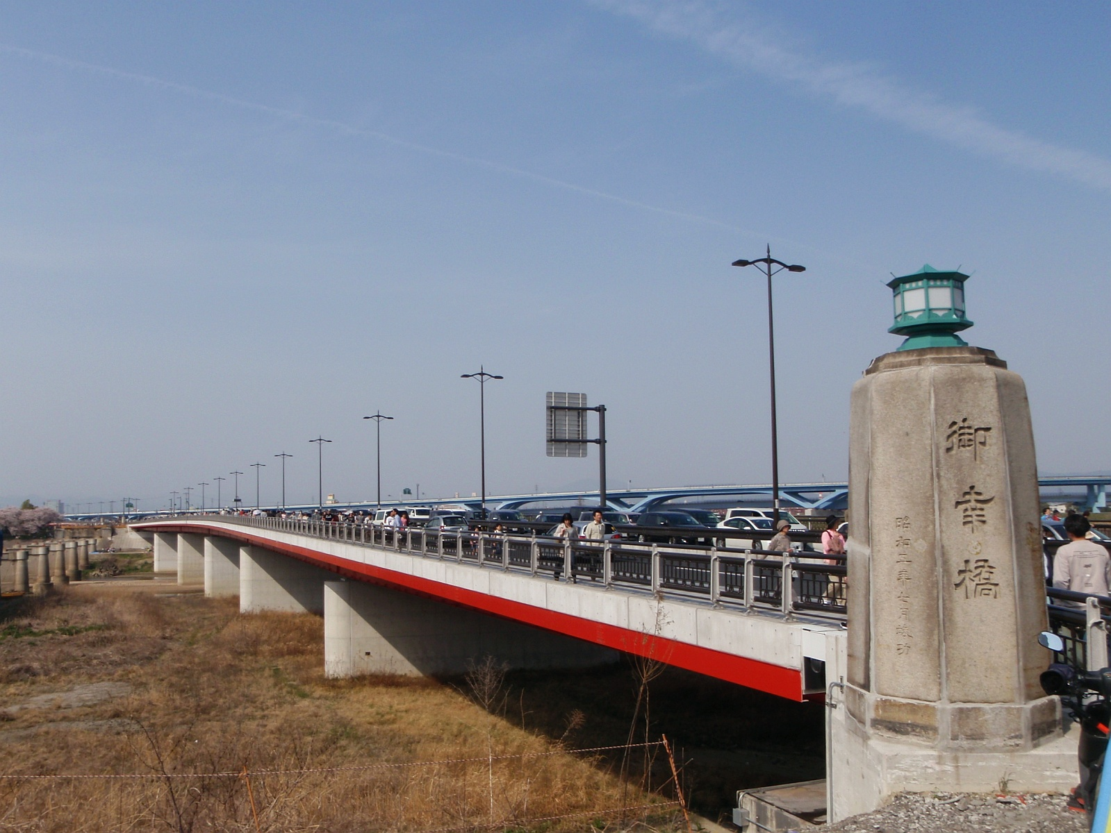 木津川に架かる「木津川御幸橋」。「淀川御幸橋」とあわせて御幸橋を成す。両側4車線の車道と歩道がそれぞれ設けられている。また、橋のたもとに設置された石柱は下流側に架設されていた旧橋のものが移設されている。（京都府八幡市にて。南西側より撮影。左は解体工事中の旧橋）